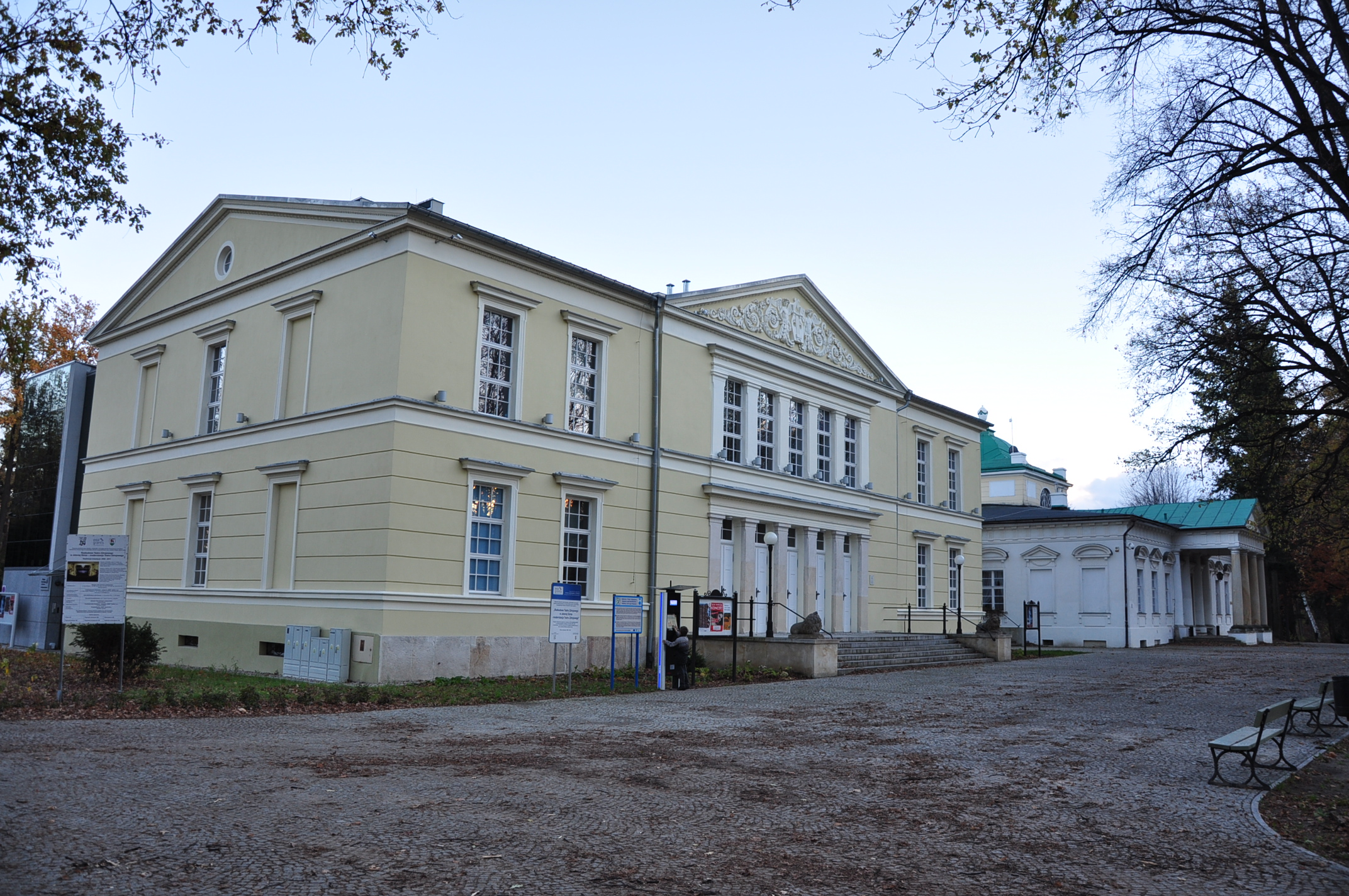 Jelenia Góra, teatr zdrojowy (w parku), 1833